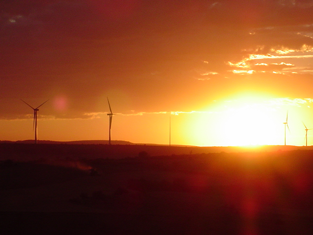 Parque eólico de Maranchón